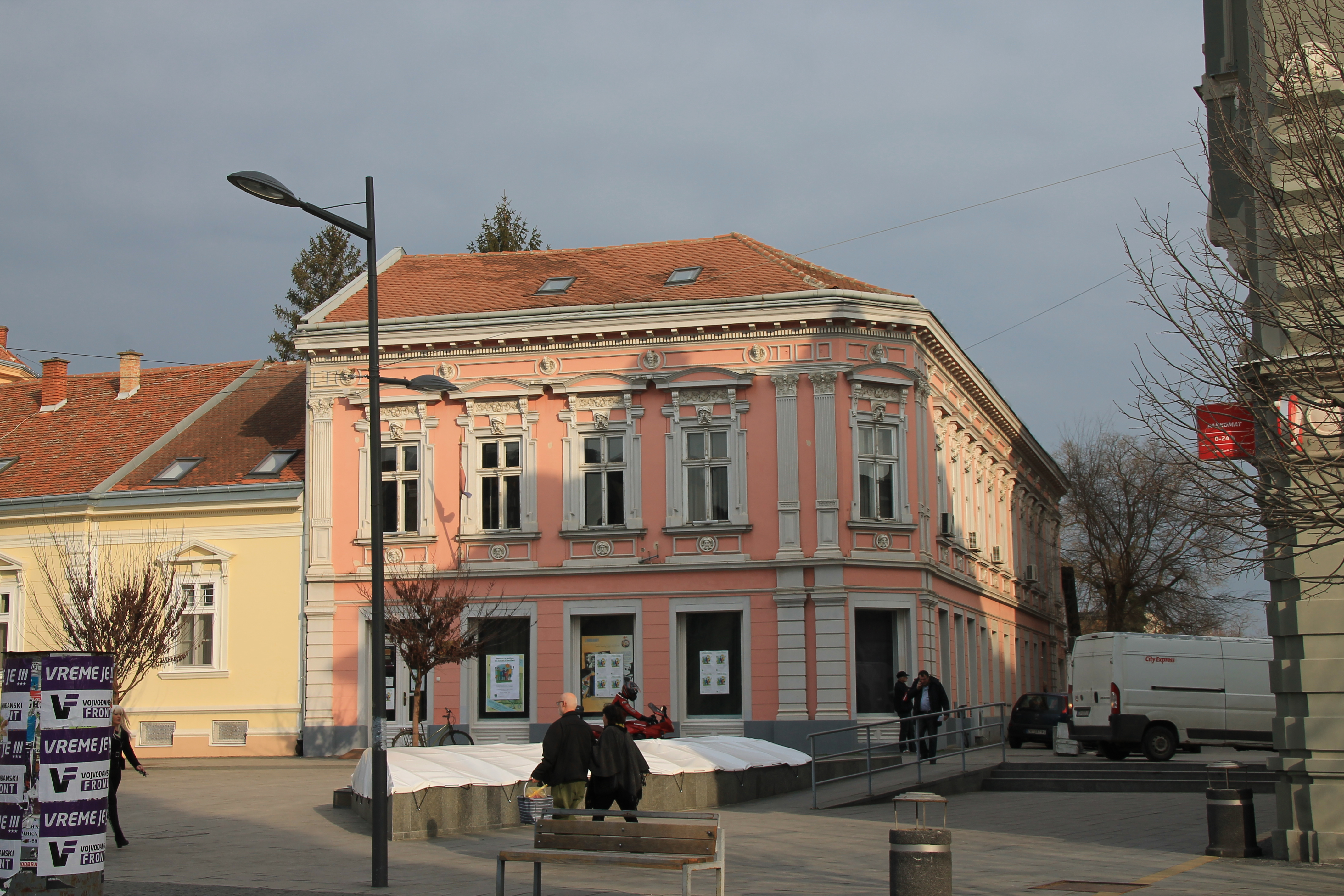 Staro jezgro Zrenjanina